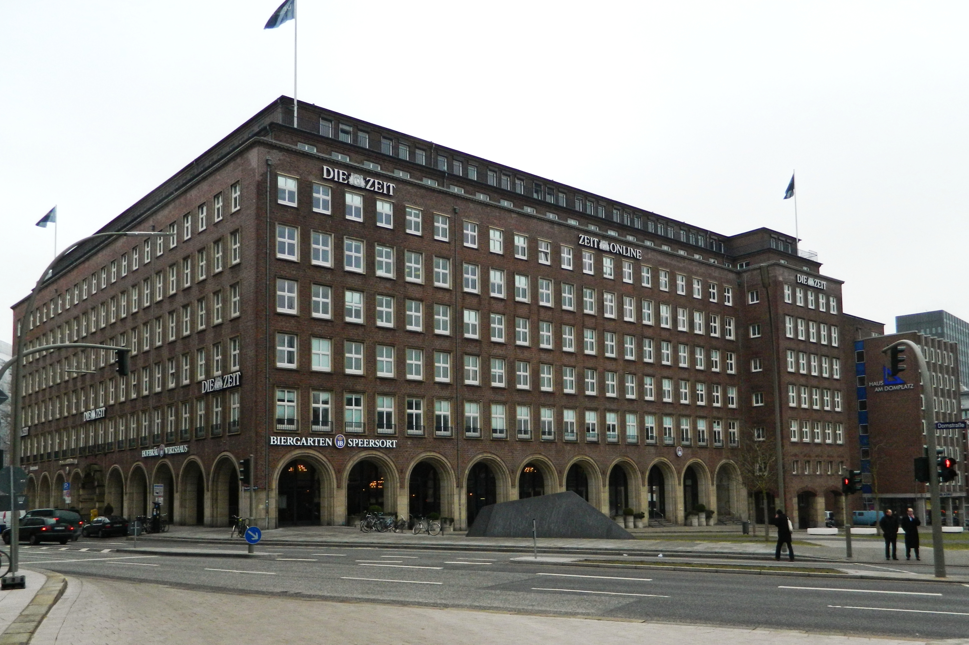 Speersort(Die Zeit)